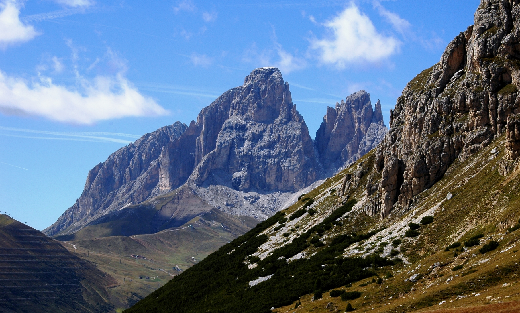 Alpen, Passo Pordoi, 2239m